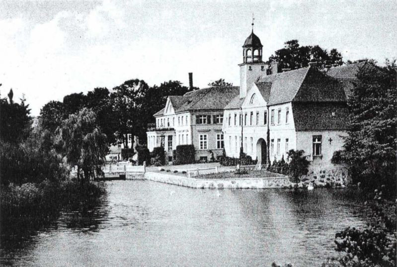 Das Puttkamer Schloss Karstnitz auf dem Gut Deutsch Karstnitz heute: Karżniczka (Polen) Datum: um 1900 (nach überlieferter Aussage und Bildvorlage meiner Oma Dolly Maxa von Puttkamer) Urheber: unbekannt Quelle: Grafikadresse